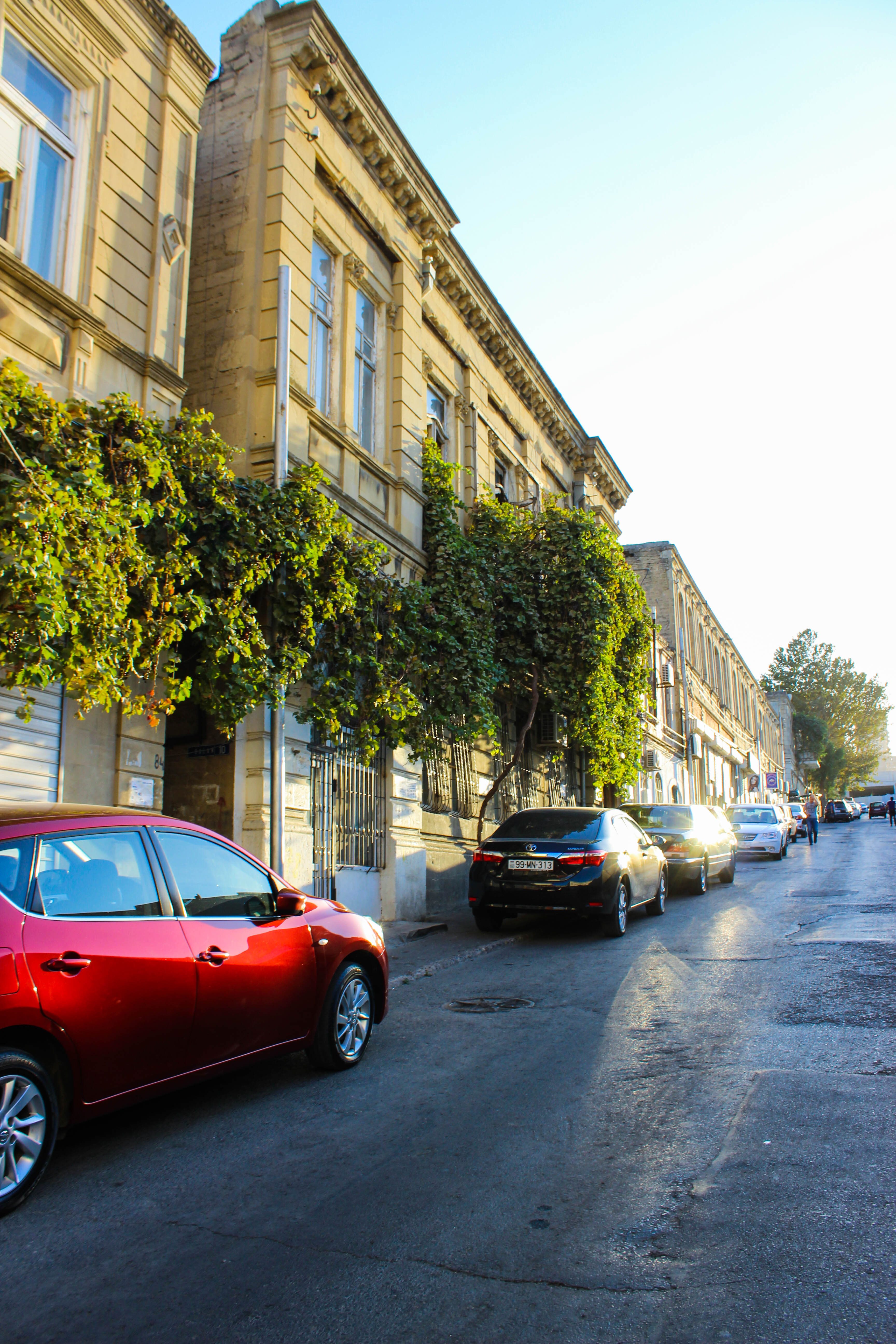 Yaşayış binası, Çingiz Mustafayev 82